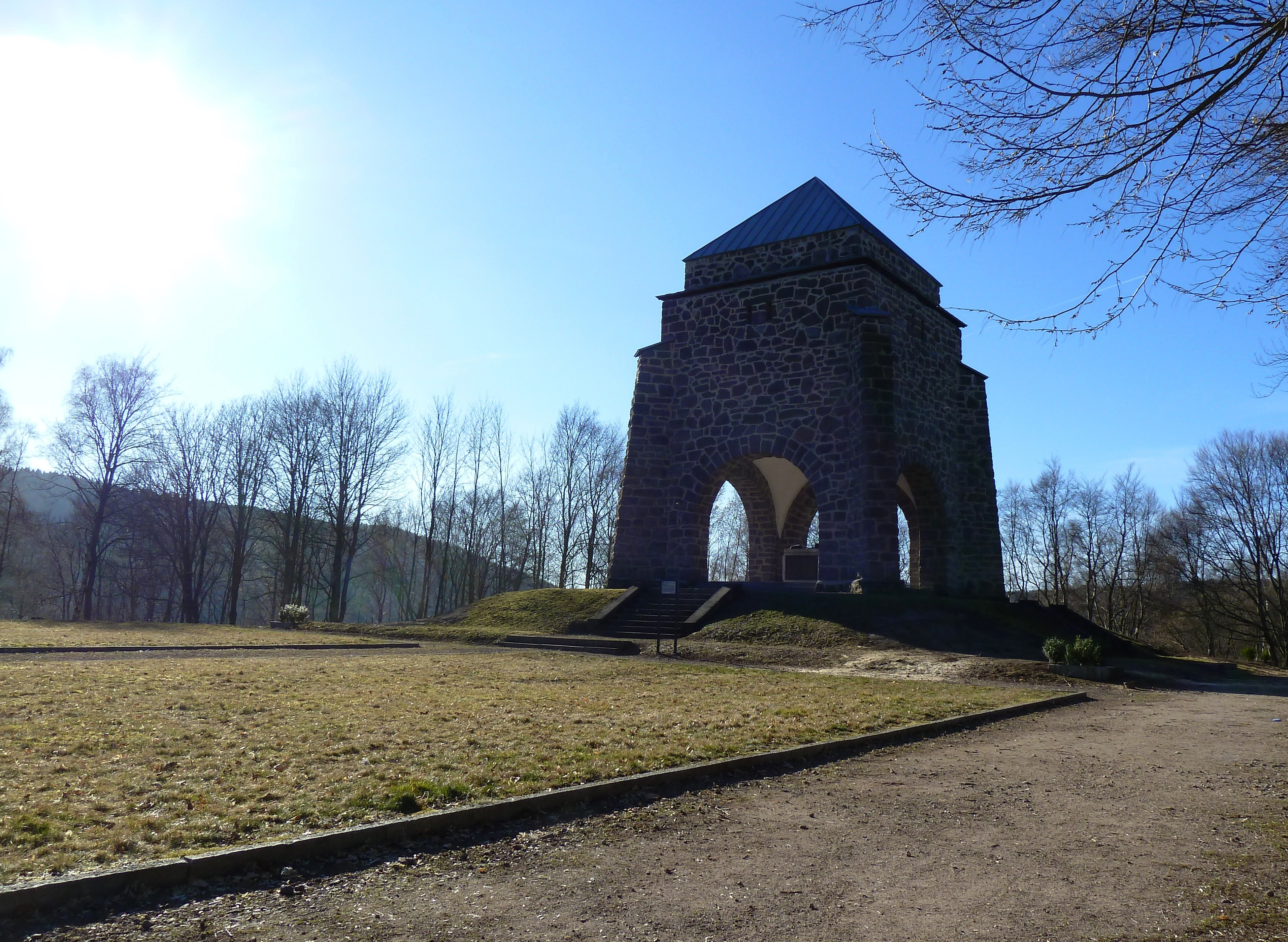 Kriegerdenkmal Zella-Mehlis 2014